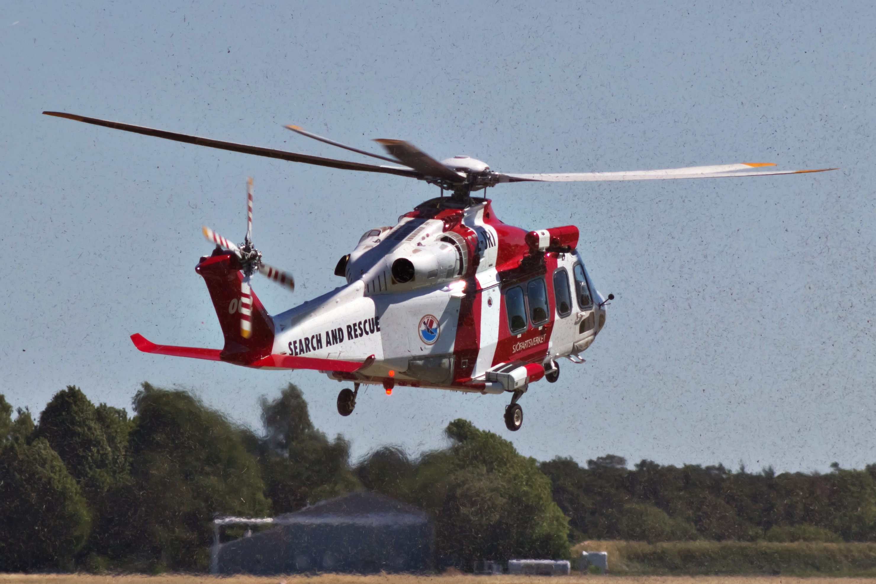 AgustaWestland AW139 do Sjöfartsverket despegando do aeroporto de Visby.